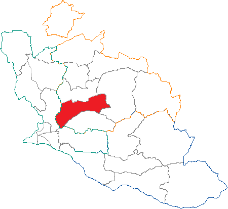 Situation du canton dans le département de Vaucluse (France)